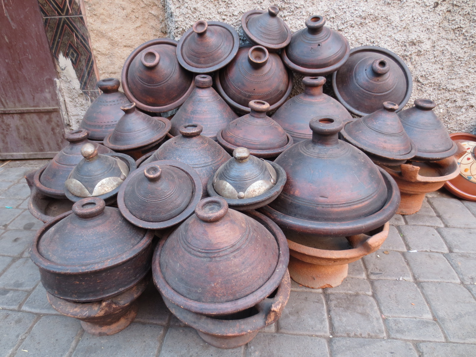 Tajine